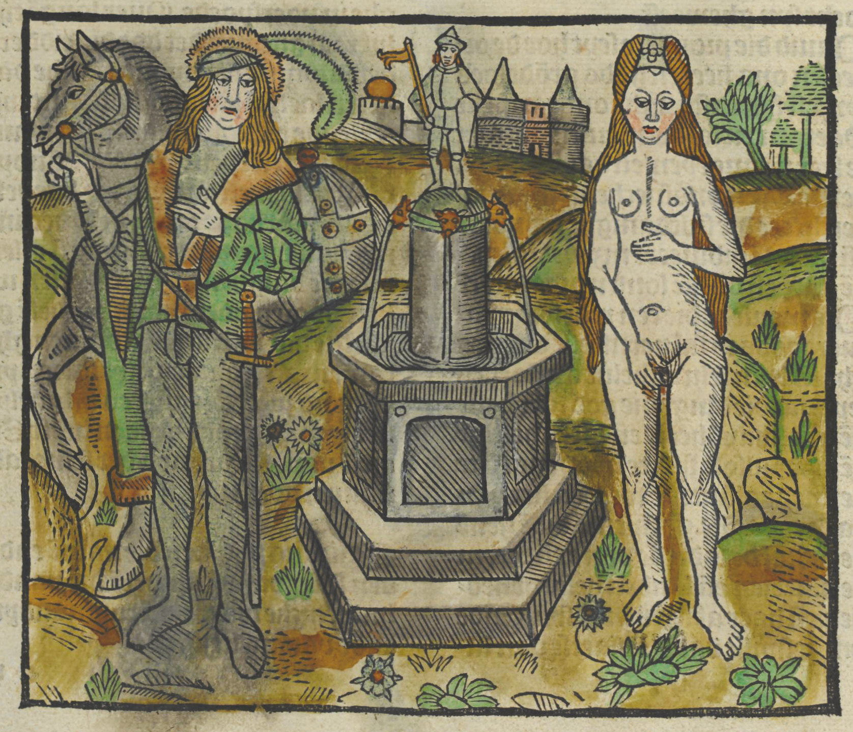 Première illustration de l'incunable d'Anvers daté de 1491, imprimé par Geraert Leeu, de l'ouvrage de Jean d'Arras, Histoire de la belle Mélusine. Cette gravure sur bois, extraite de l'incunable en version néerlandaise, représente la rencontre entre la fée Mélusine et son futur époux, le comte Raymond. La plupart des illustrations de ce livre ont été créées spécialement pour l'impression de cette version.